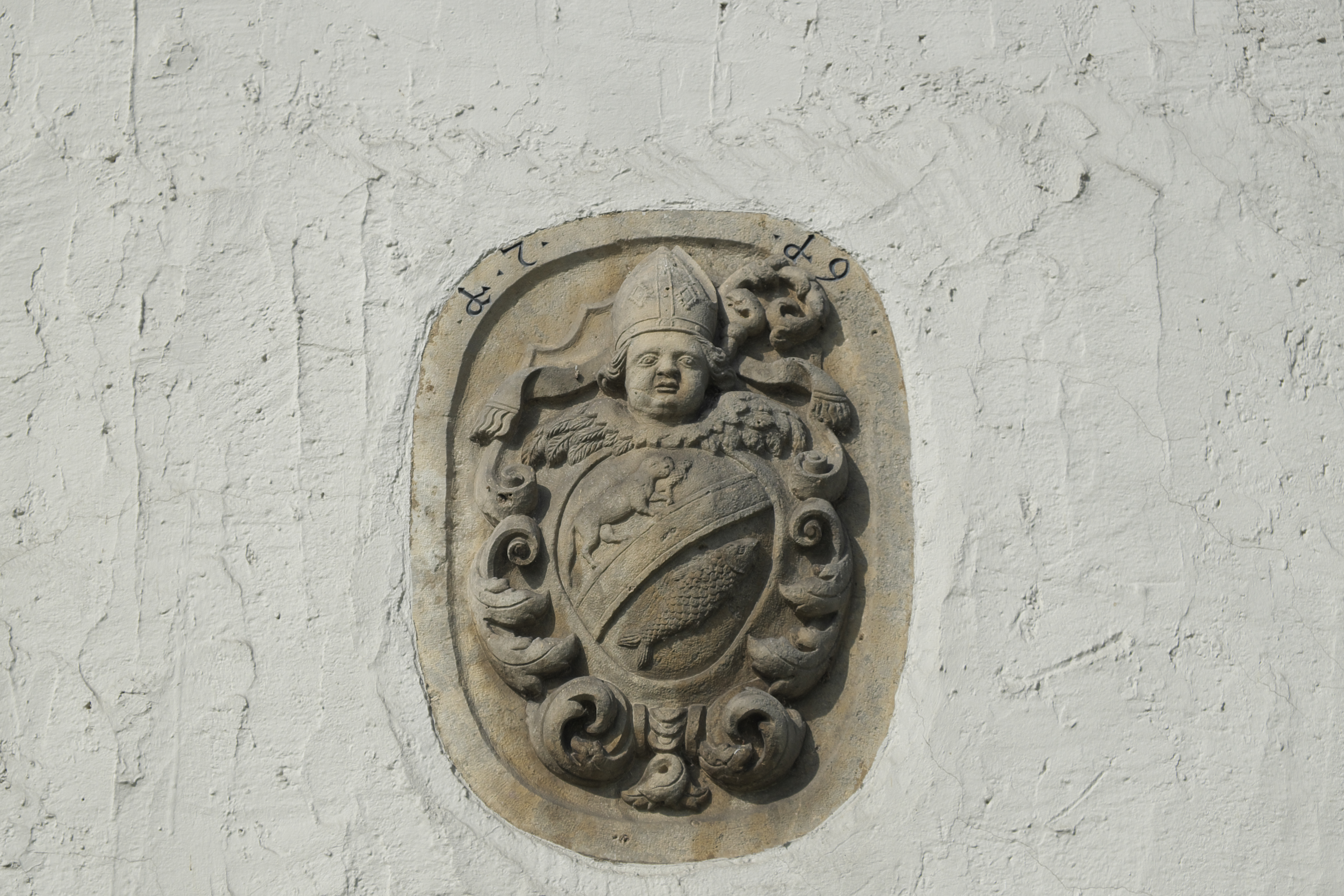 Pfarrhaus in Ziertheim (Landkreis Dillingen an der Donau/Bayern), Eingang mit Wappen des Neresheimer Abtes Amandus Fischer und der Jahreszahl 1719